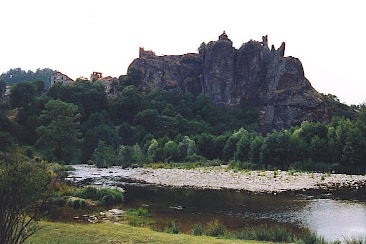 Arlempdes, comm. de la Haute-Loire, France (région Auvergne). Le château sur son piton rocheux surplombant la Loire. Vue prise depuis l'est.